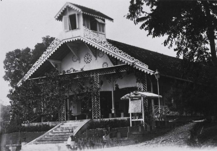 Foto. Woning van de assistent-resident, Donggala